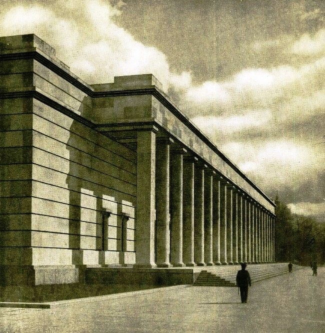 Haus der deutschen Kunst zu München im Jahre 1939 (Aufnahme: Jaeger und Goergen), NS-FRAUENWARTE 1939, Nr. 3, 1.8., S. 64